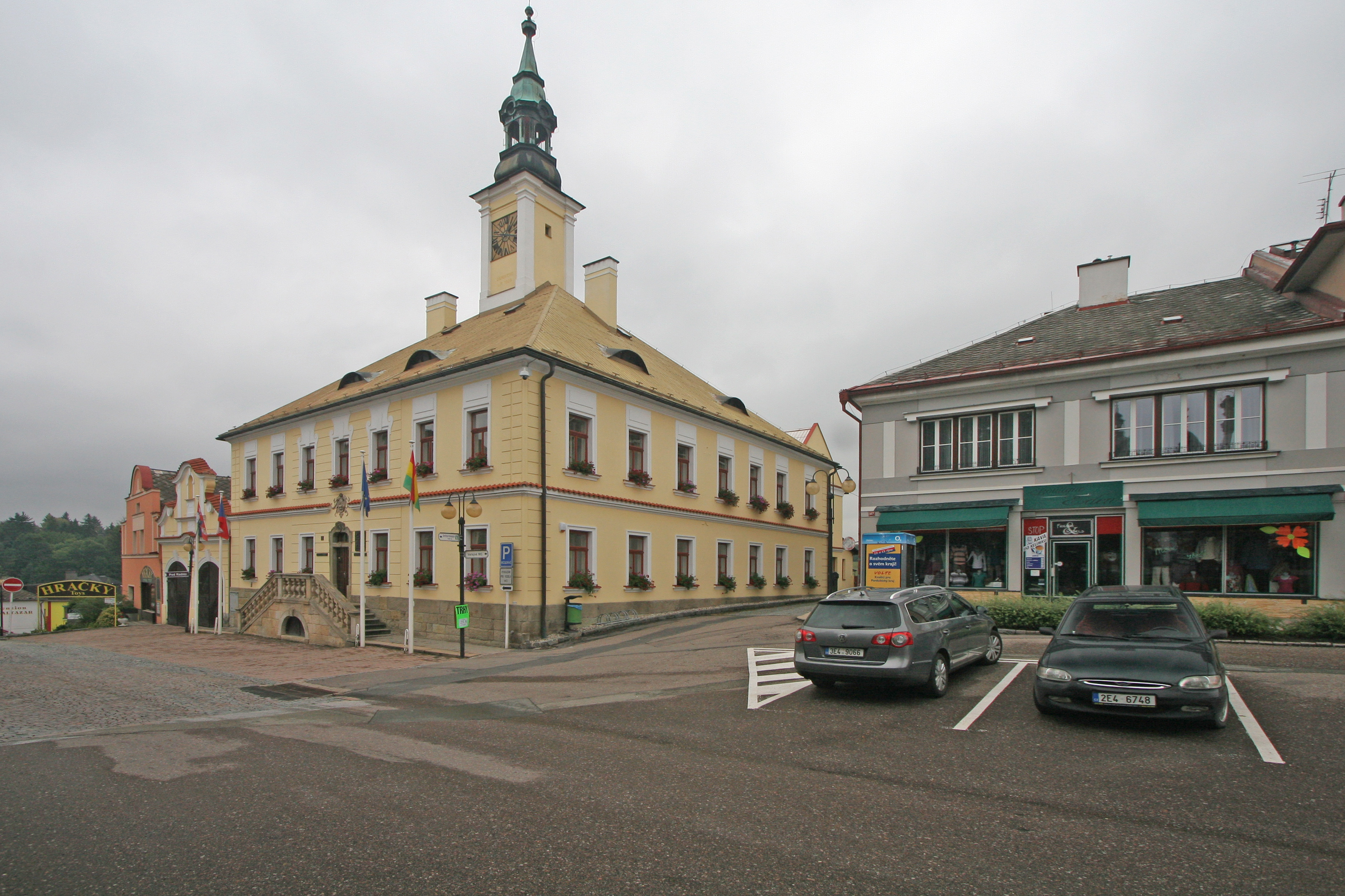 Radnice se starou hasičskou zbrojnicí (Žamberk), Masarykovo nám. 166, Žamberk